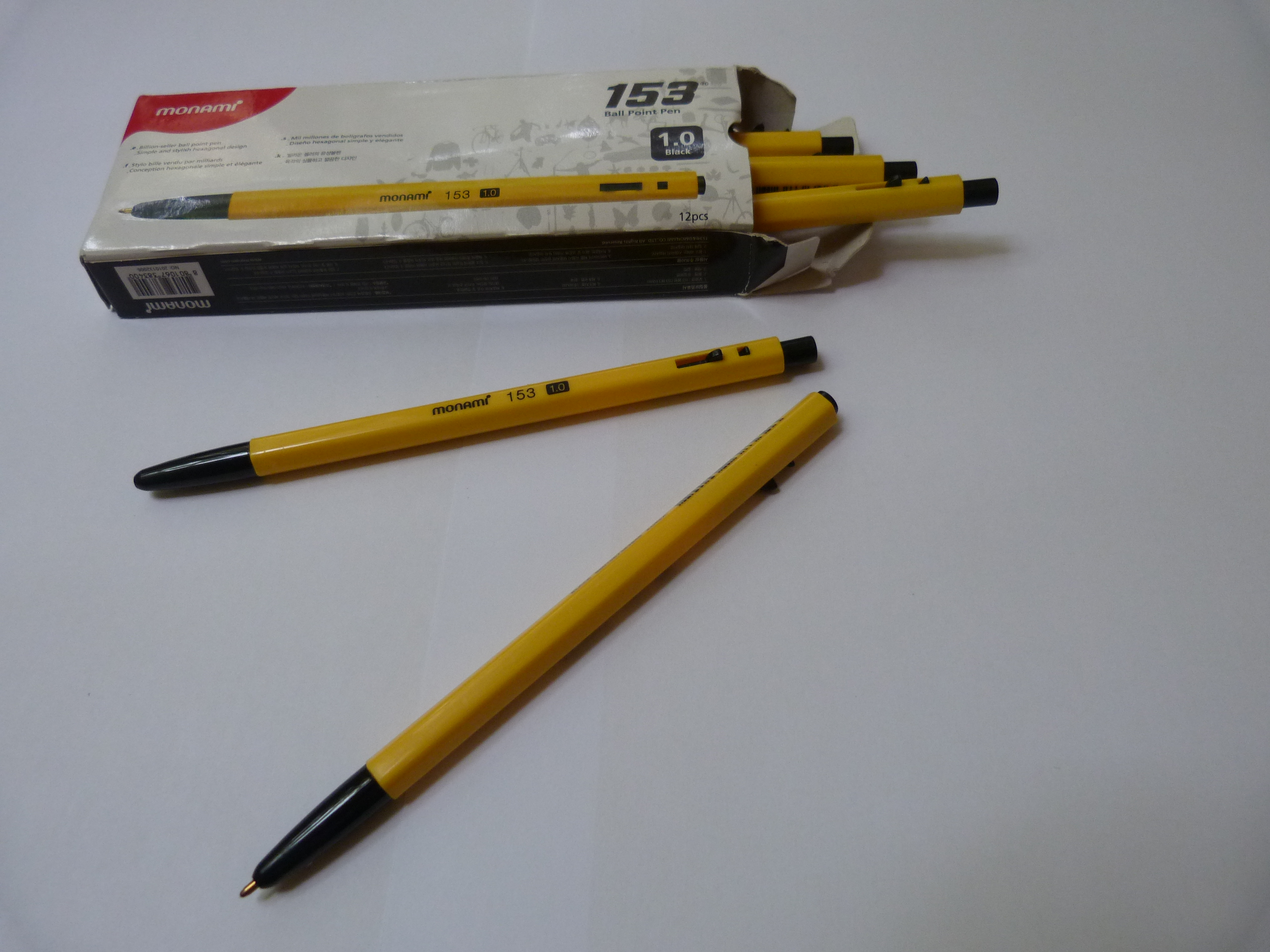 מבחר עטים של חברת "מונאמי".